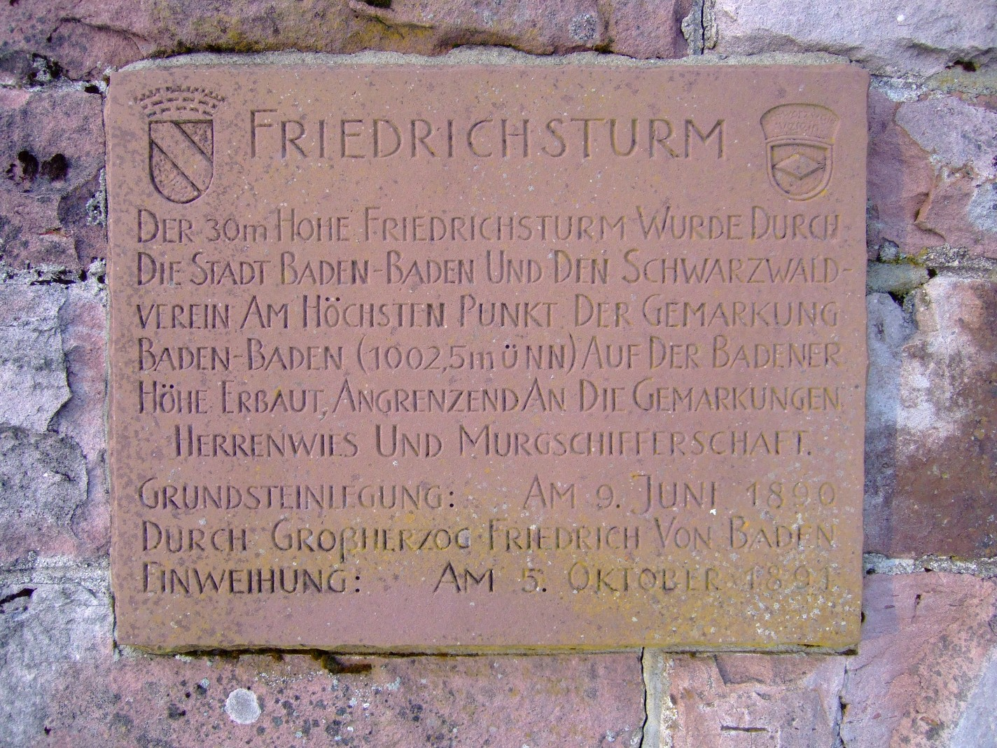 Informationstafel am Friedrichsturm (Badener Höhe bei Baden-Baden, Schwarzwald)